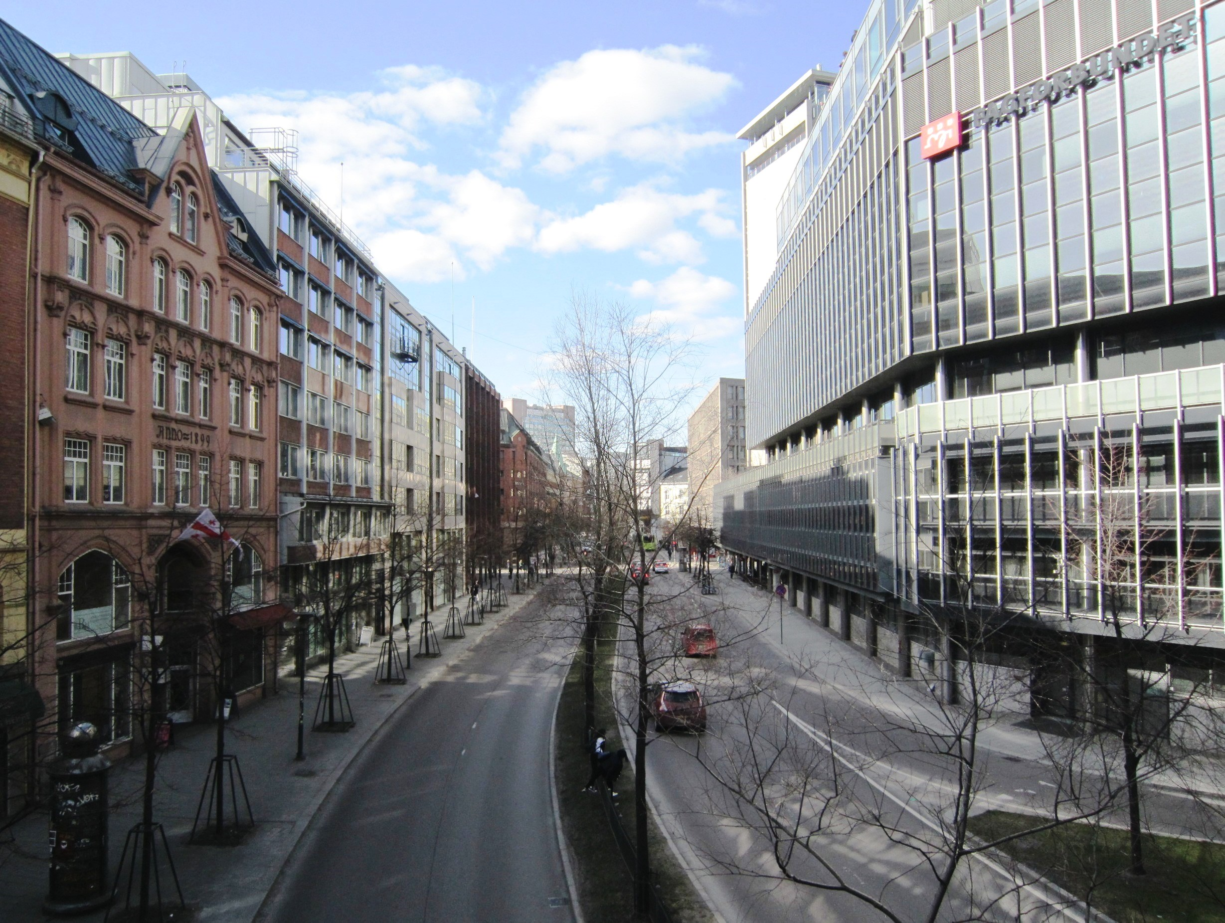 Pilestredet nordvestover fra Sentrum P-hus (tidligere Ibsen P-hus)